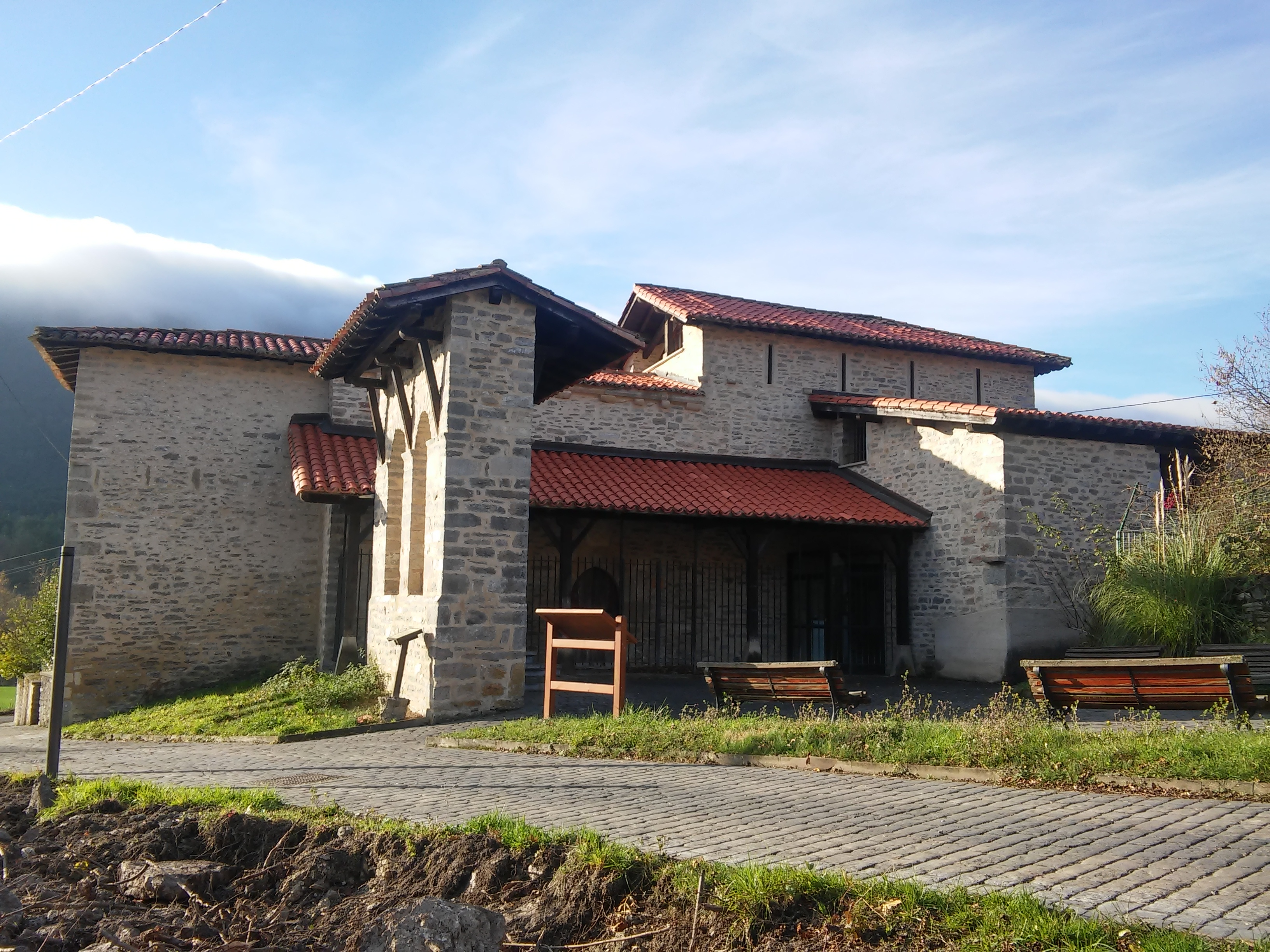 Urbina Basabeko dorrea (Kuartango)